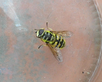 Photo perso